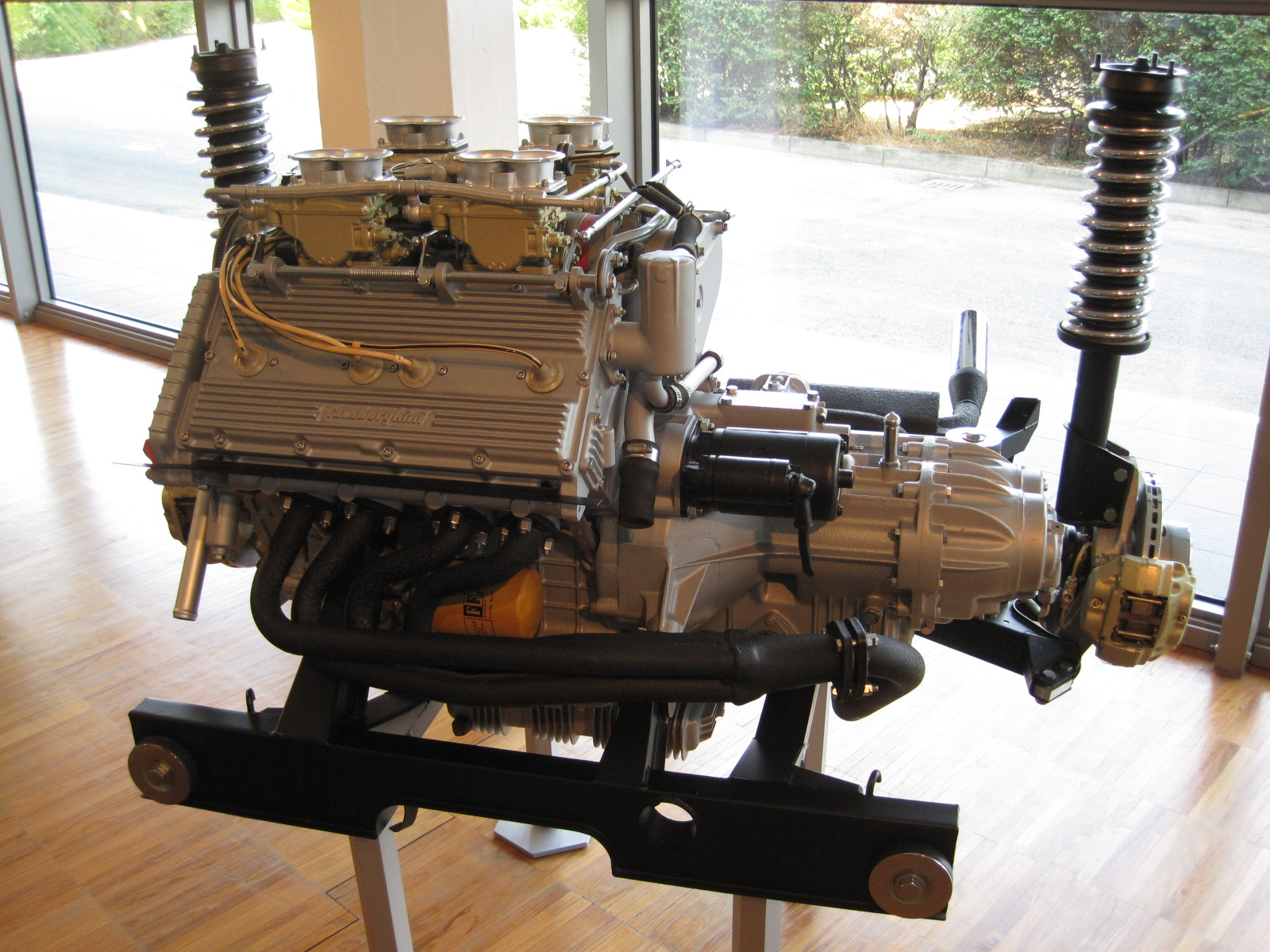 Musée Lamborghini - Moteur V8 L 302 - 3,5 Litres - Lamborghini Jalpa